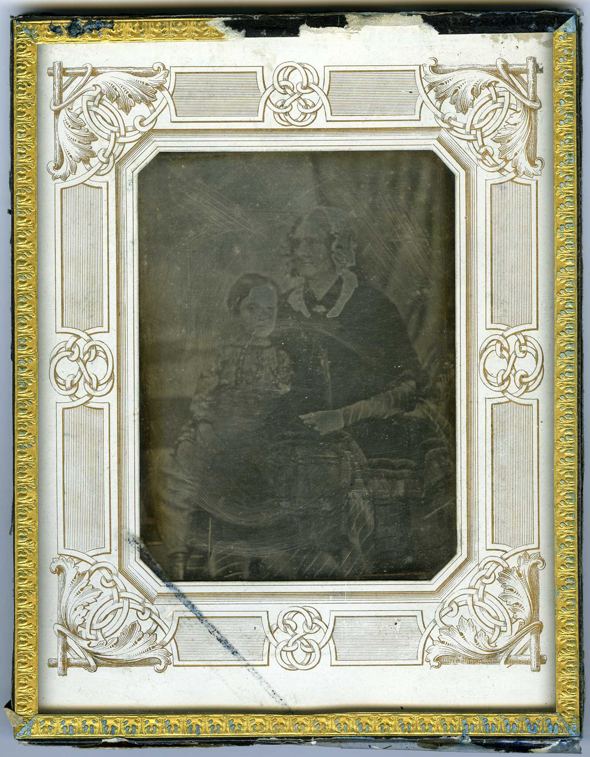 Dagerrotüüp Tartu Linnamuuseumi kollektsioonis. Daguerreobase:TM_F479 MUIS:TM F 479